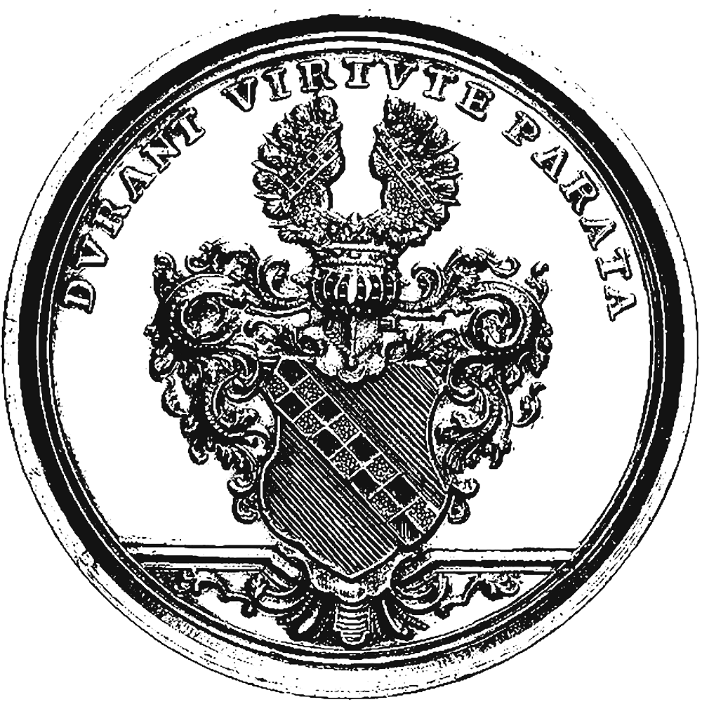 Wappen der von Zwierlein mit Wahlspruch „Durant virtute parata“ [Dauerhaft ist das mit Tapferkeit Erworbene]